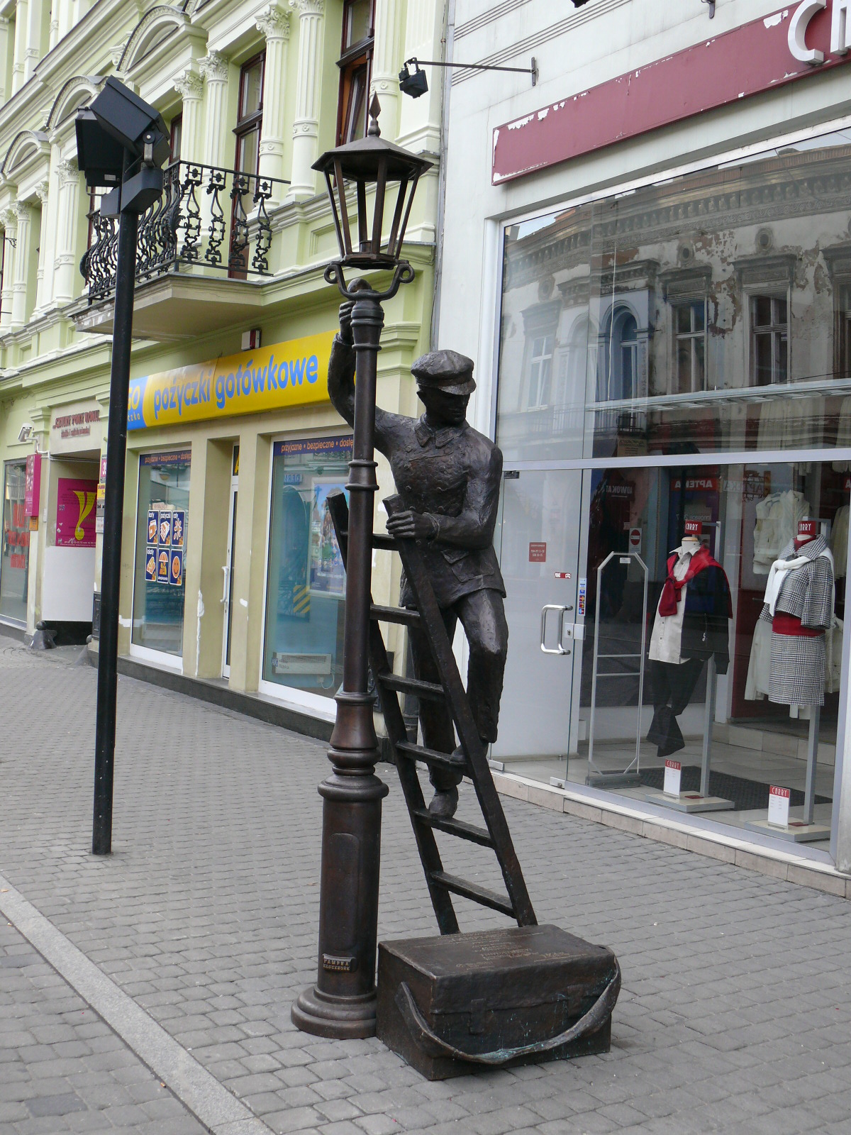 "Lampiarz" w Łodzi